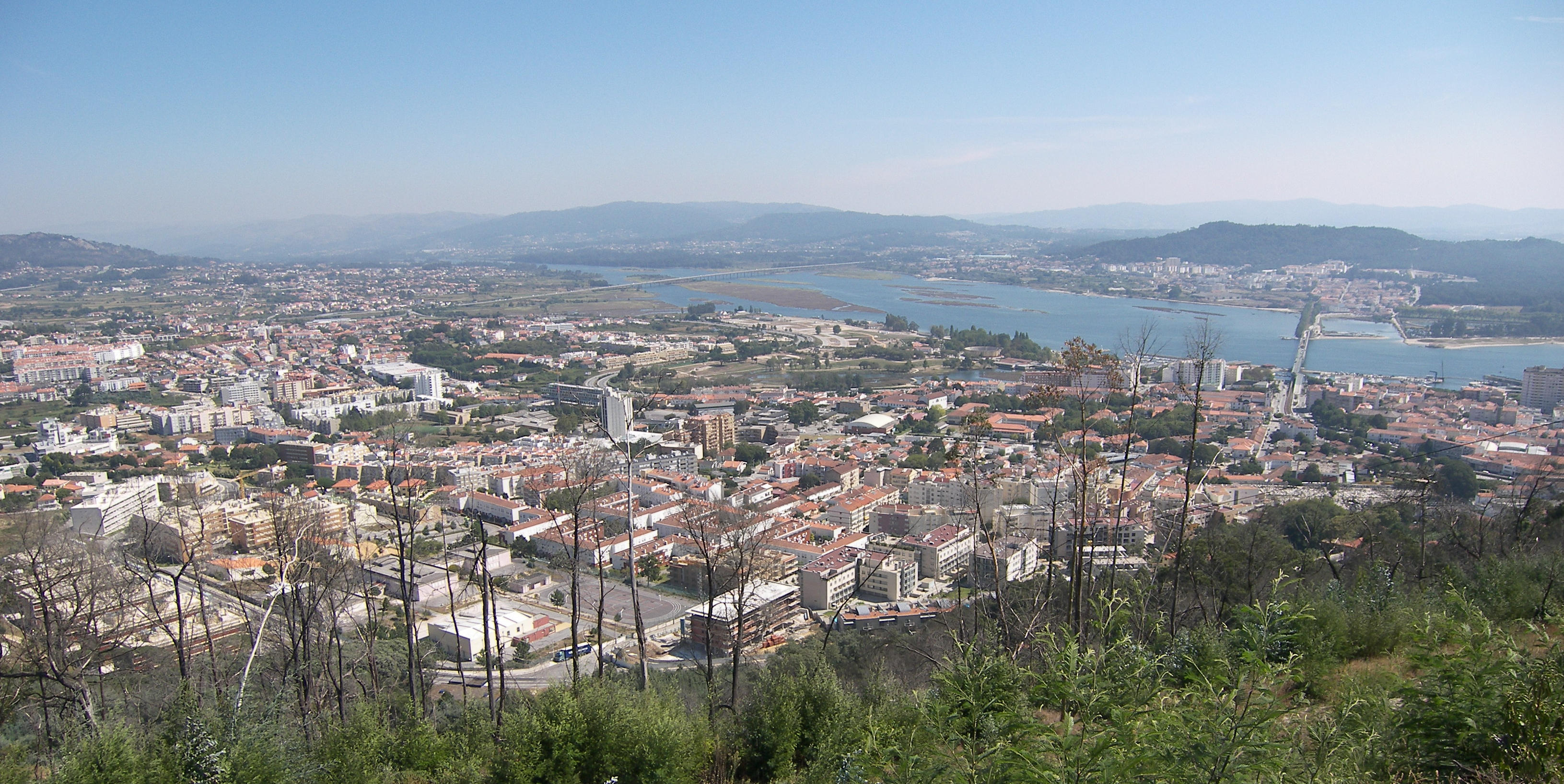 Viana do Castelo vom Monte Sta. Luzia aus